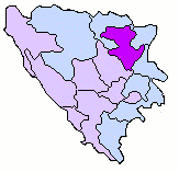 BosniaCanton Tuzla